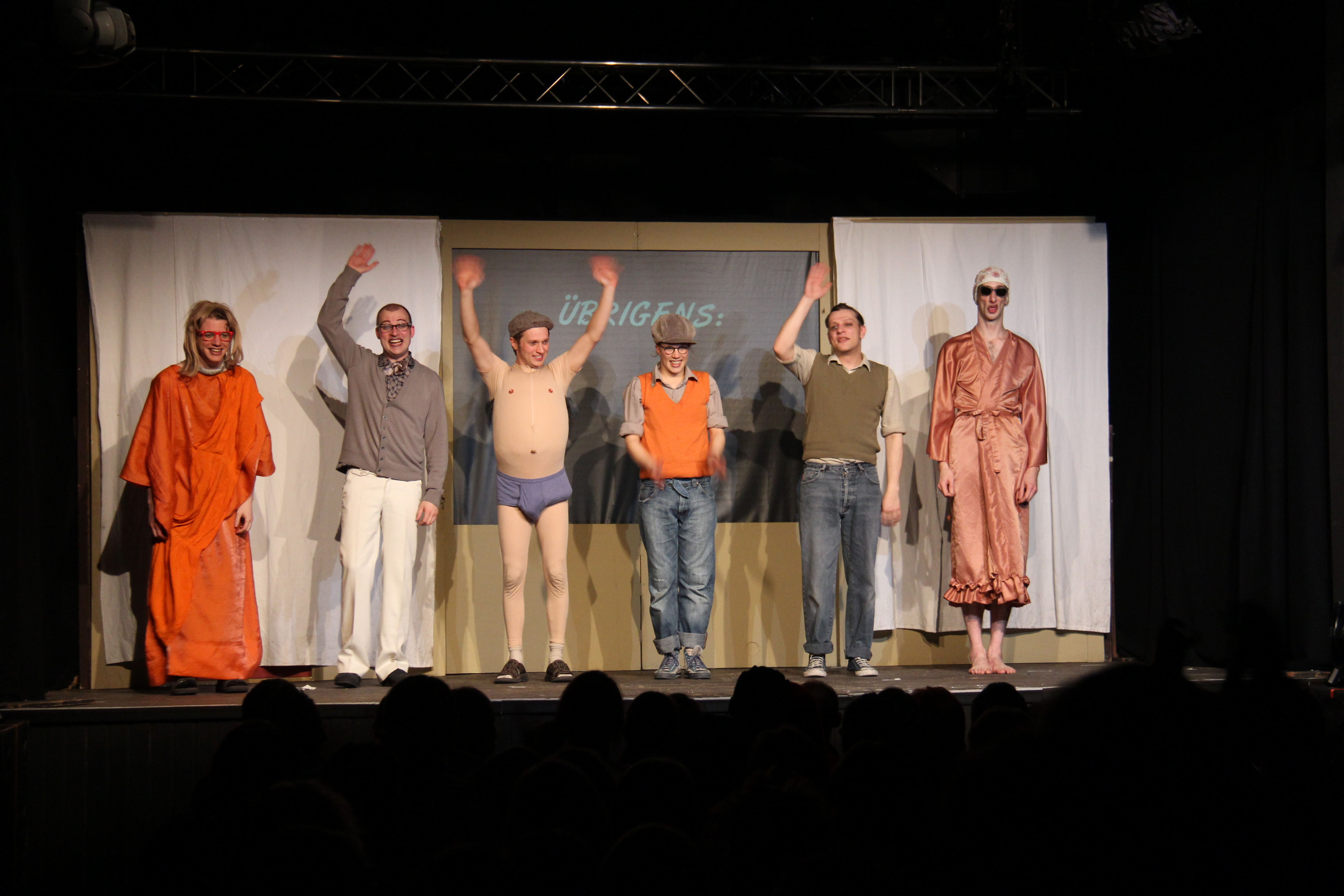 Das Vollplaybacktheater mit seinem Stück "Die drei ??? und der Karpatenhund" im Kulturzentrum Kreuz in Fulda